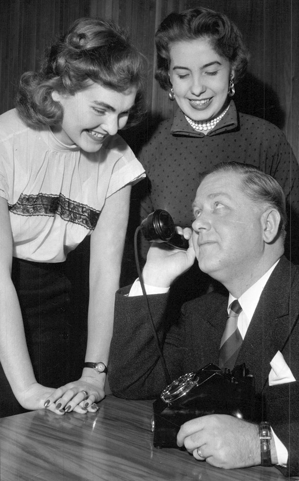 Sätt och vett i telefonen – Kurs på Byggnadsföreningen.Från vänster fru Birgitta Zetterman, Ekströms maskinaffär, och fröken Anita Hjälm från svenska BP konstaterat att civilekonom Börje Lindberg håller telefonluren felaktigt.